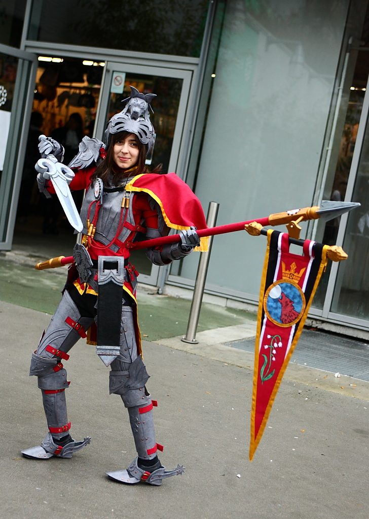 Paris Manga 9, February 2010, Parc des expositions de la porte de Versailles.